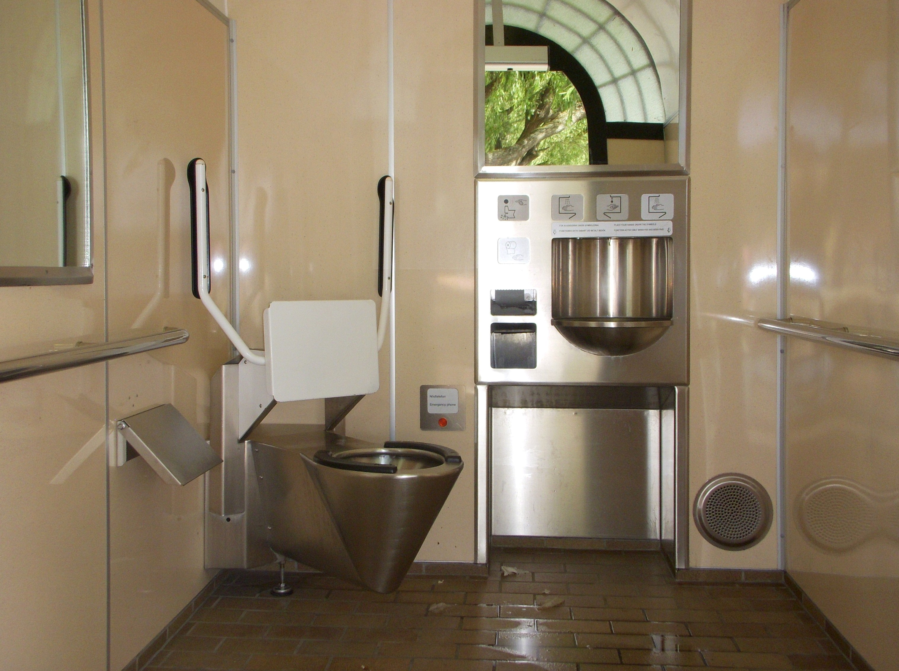 Stadstoaletten "Paragon" vid Norr Mälarstrand, interiör